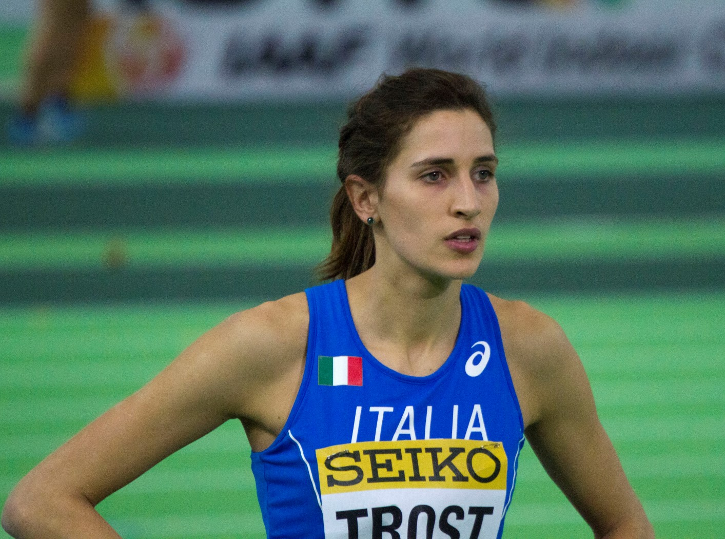 5039 trost